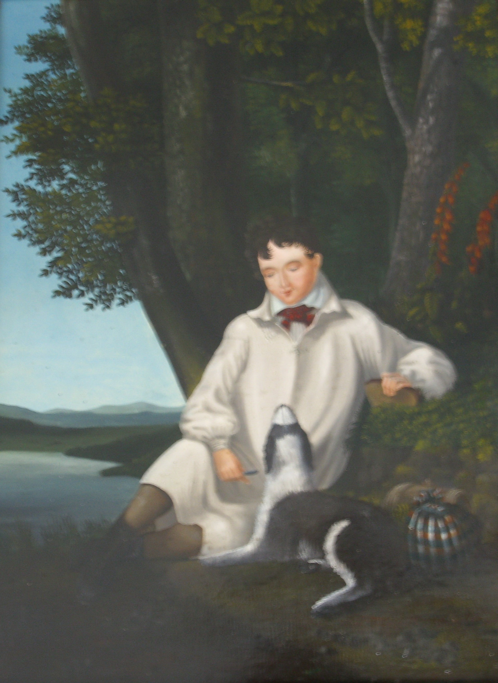 Selbstportrait Franz Kuchenbuch als junger Mann